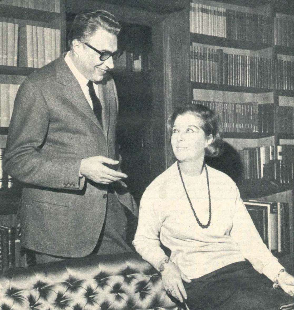 L'attrice Elsa De Giorgi e lo scrittore Luigi Silori nella casa di quest'ultimo a Roma (1959)